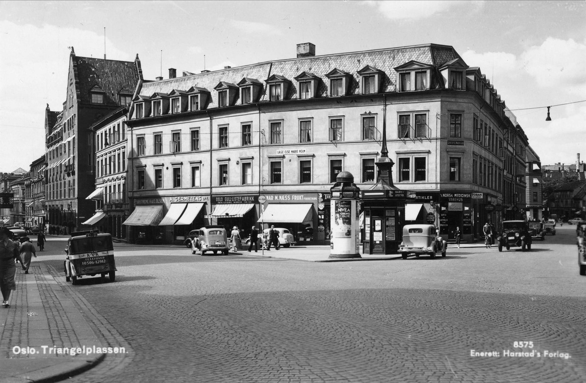 Professor Aschehougs plass ca. 1950. Også kalt Triangelplassen.